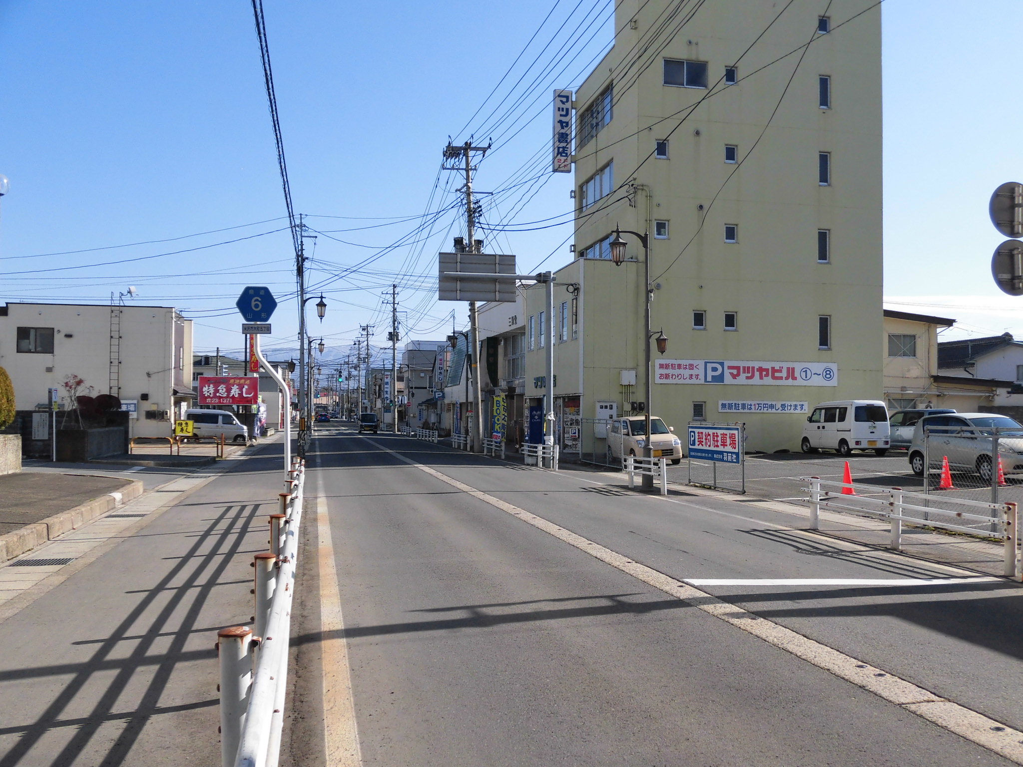 山形県道6号米沢停車場線。 撮影地は山形県米沢市大町5丁目付近。